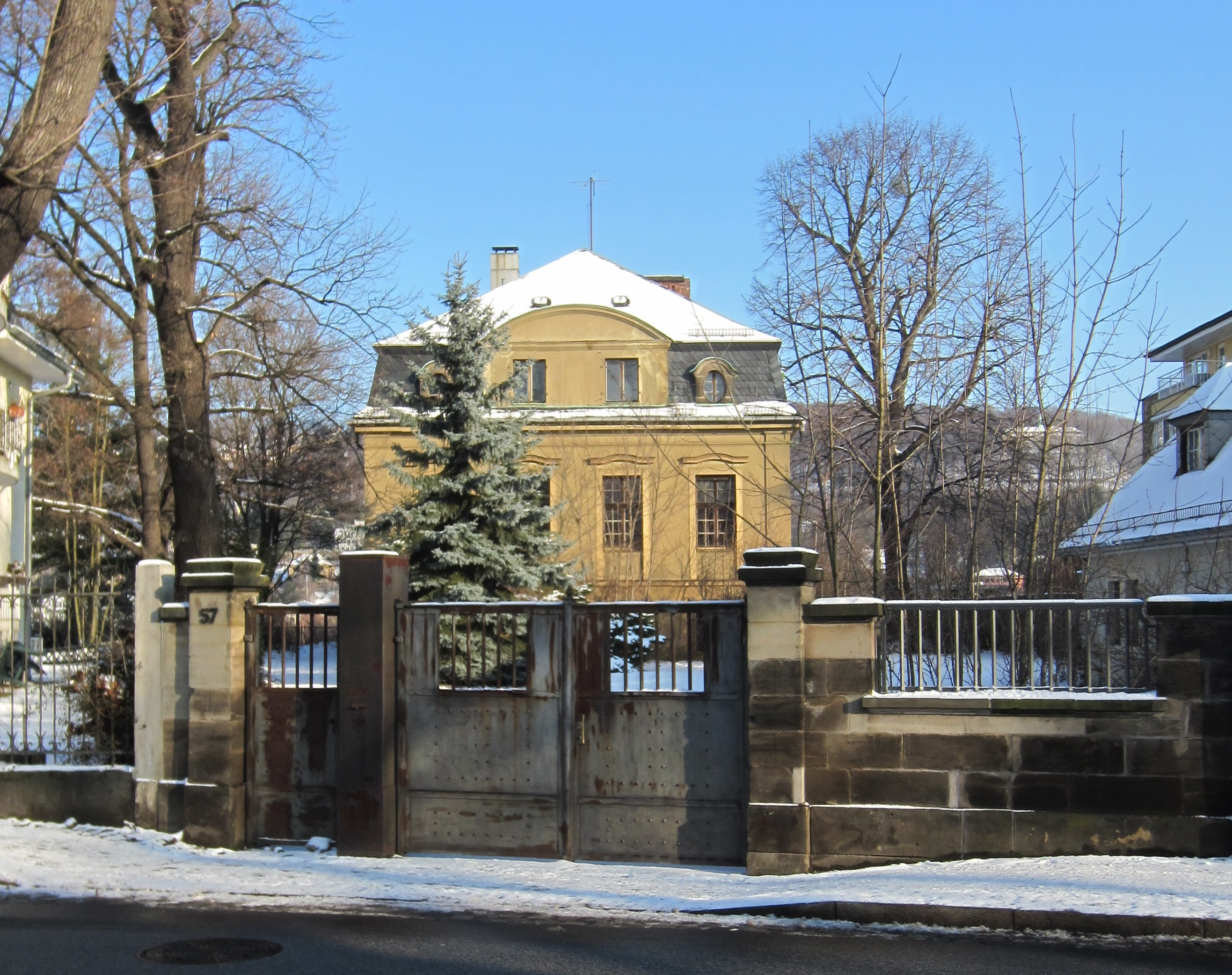 Villa Romana in Dresden-Blasewitz, Tolkewitzer Straße 57; unter Denkmalschutz